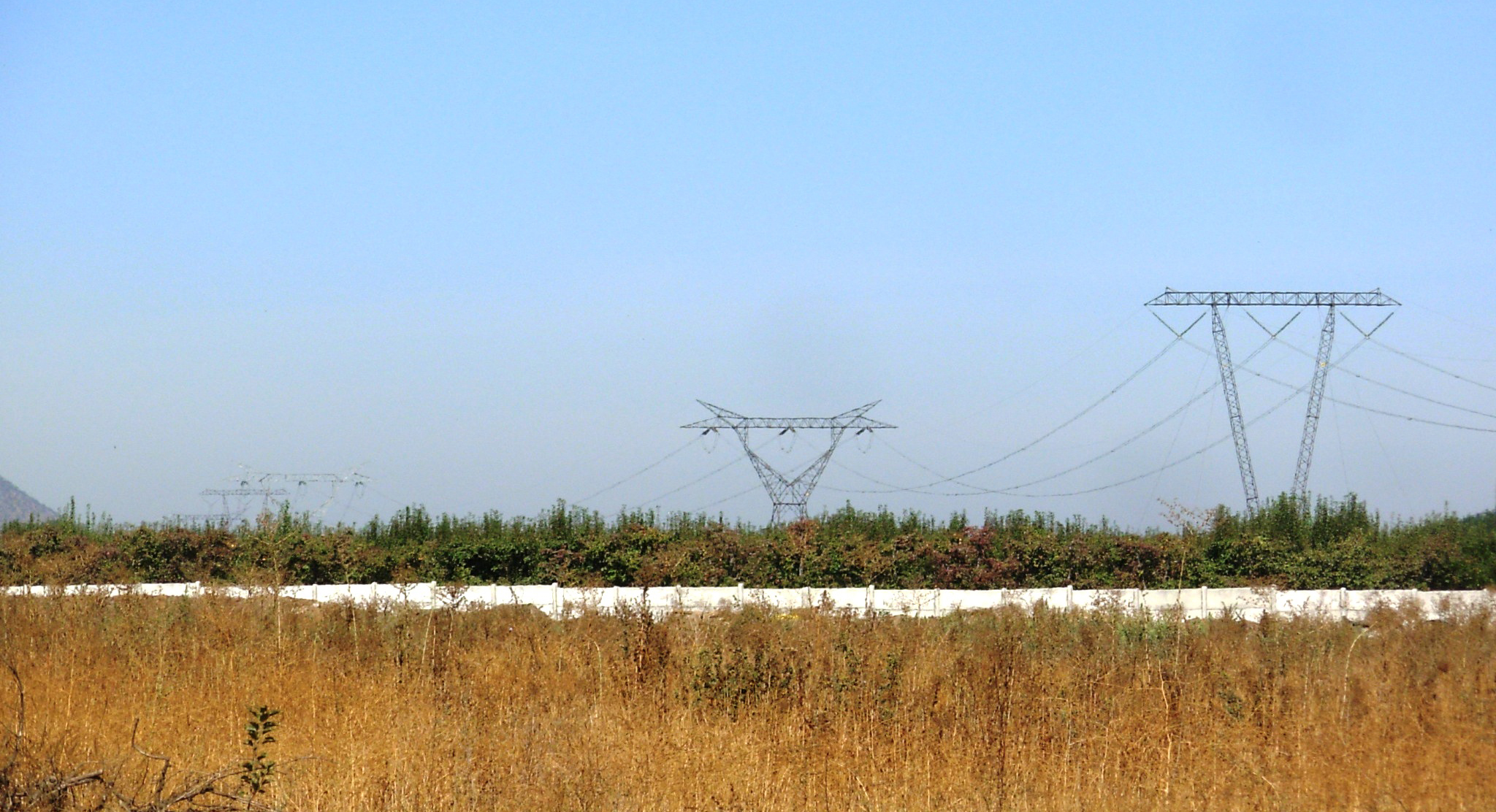 Líneas de alto voltaje correspondientes al Sistema Interconectado Central de Chile (SIC), en las cercanías de Rancagua.